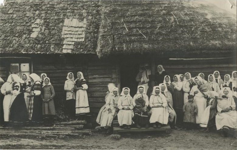 Женщины деревни Микитамяэ в народных костюмах сету, 1920-1930-е годы. Снимок сделан на народном празднике "Кирмаш".